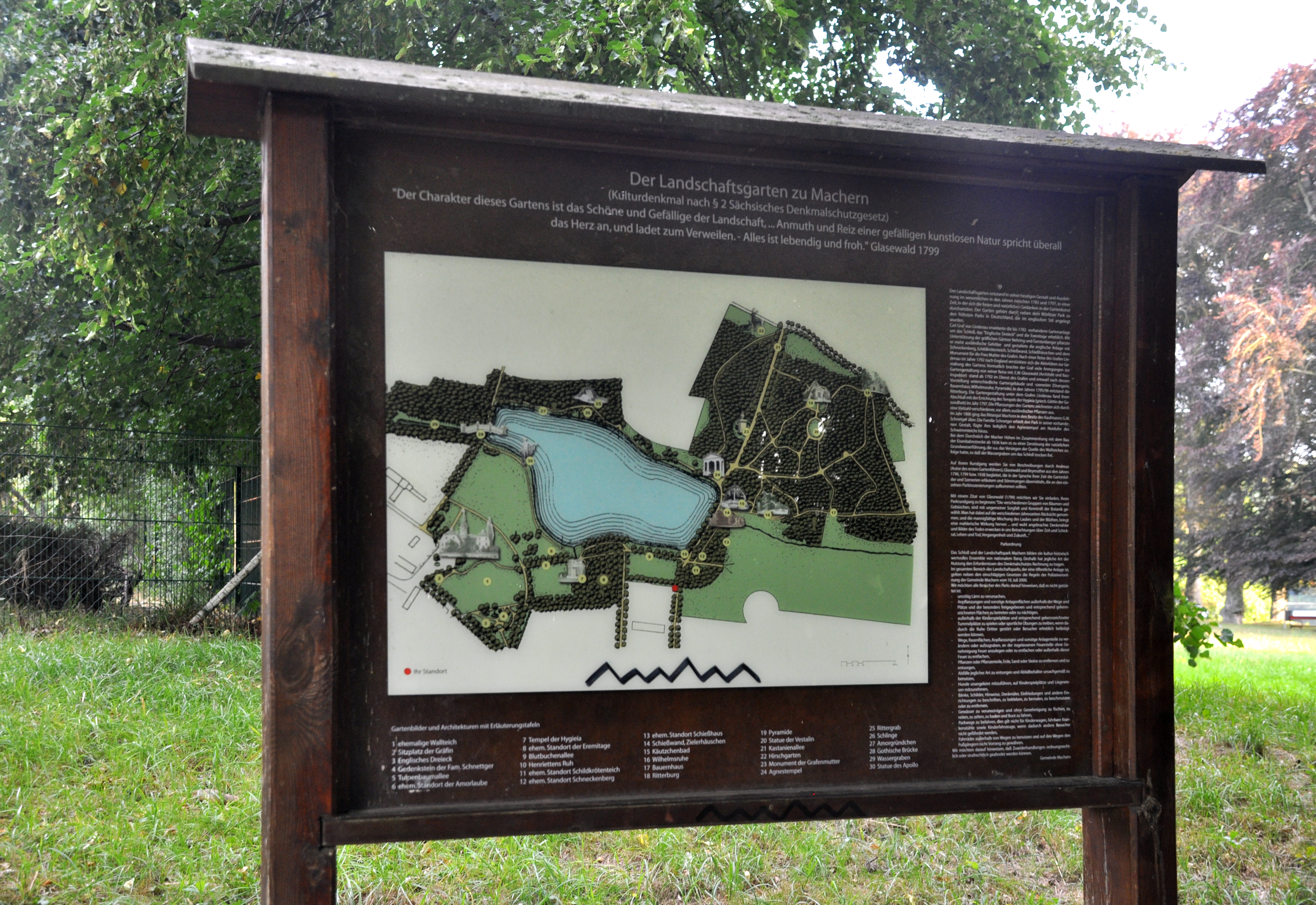 Machern, Schlosspark, Informationstafel